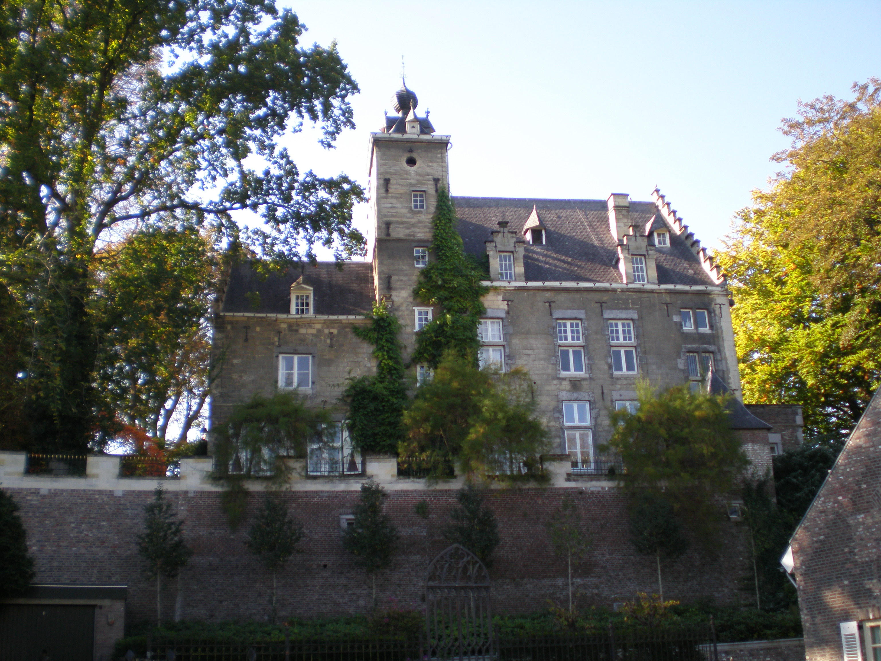 Kasteel Huis De Torentjes, Sint Pieter-Maastricht